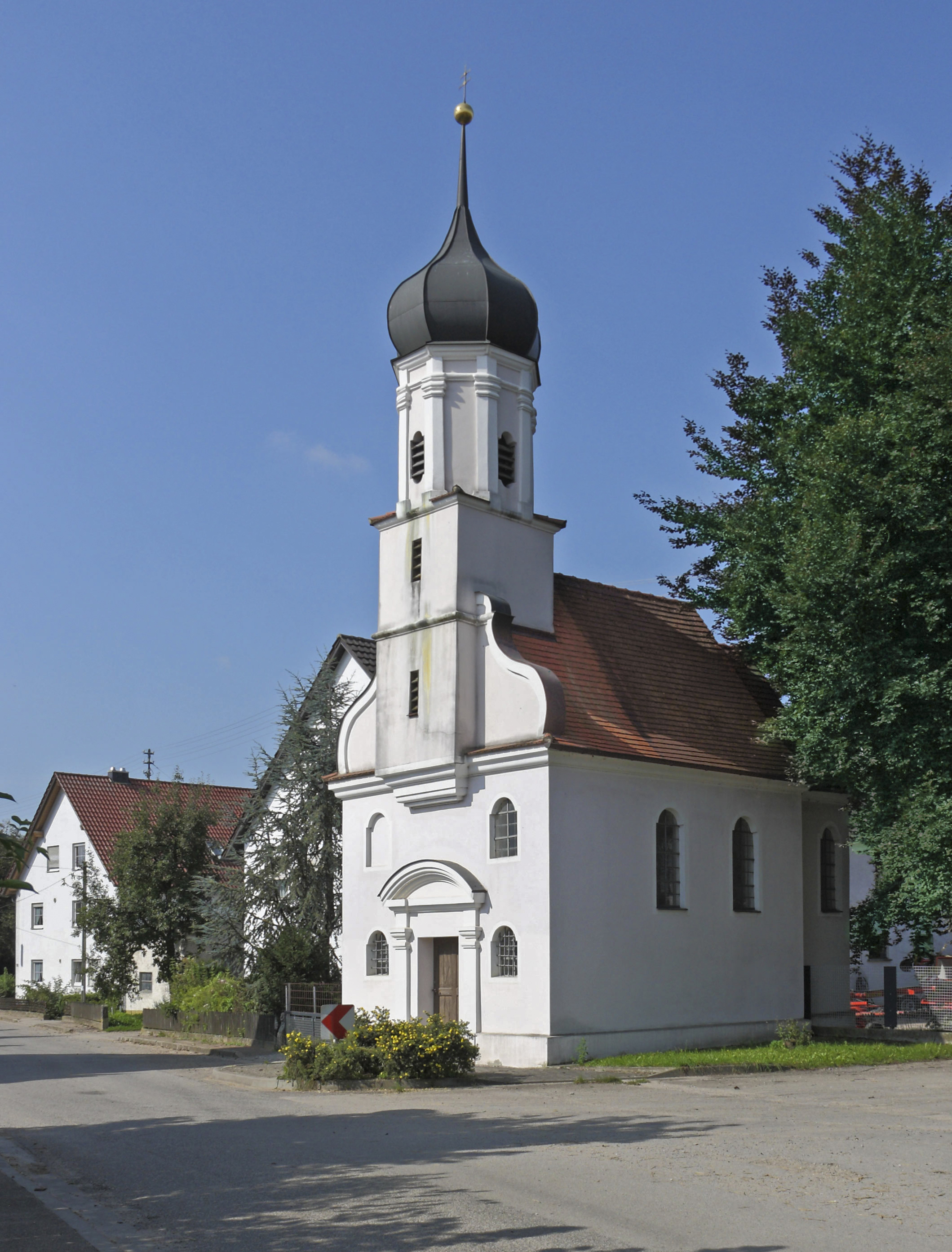 Kath. Filialkirche zur Hl. Dreifalltigkeit in Egenhofen, Gemeinde Kammeltal; die 1689 vielleicht von Valerian Brenner errichtete Kirche wurde 1769 durch Joseph Dossenberger d.J. umgestaltet, gleichzeitig wurden Fresken von Johann Baptist Enderle in Chor und Langhaus geschaffen